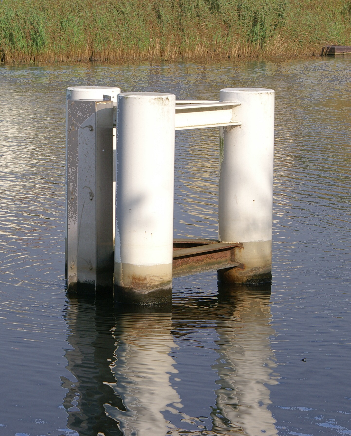 Demmin - Meyenkrebsbrücke - Durchflussmengenmessanlage